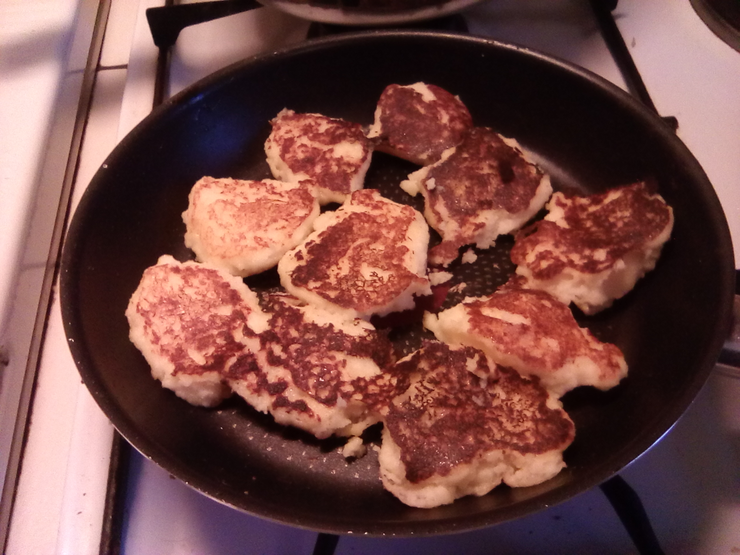 Plat alsacien traditionnel à base de lait et de semoule